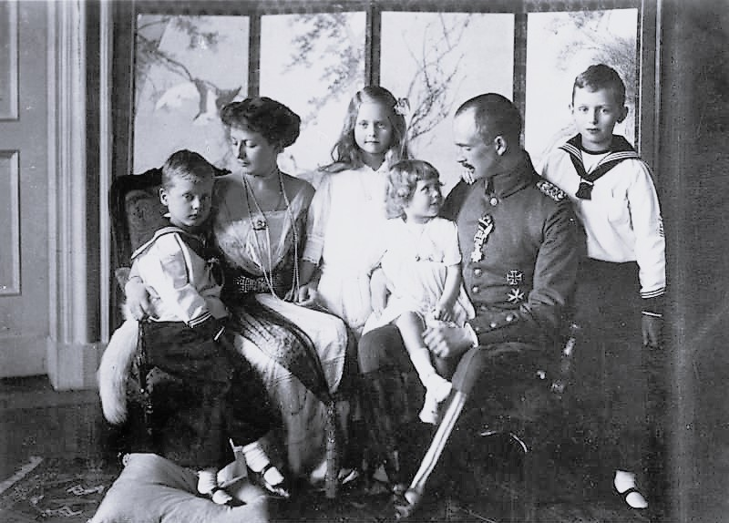 Karl-Eduard von Sachsen-Coburg-Gotha, Familie Scherl Bilderdienst Der Herzog Karl Eduard von Sachsen-Coburg-Gotha mit seiner Familie. von links nach rechts: Prinz Hubertus, Herzogin Viktoria Adelheid, Prinzessin Sibylle, Prinzesssin Karoline Mathilde, Herzog Karl Eduard, Erbprinz Johann Leopold Abgebildete Personen: Sachsen-Coburg und Gotha, Karl-Eduard von: 1884-1954, Herzog, Präsident des Deutschen Roten Kreuzes, Deutschland Information added by Wikimedia users.Photograph possibly by S. Jandt Gotha, Hoffotograf.[1]